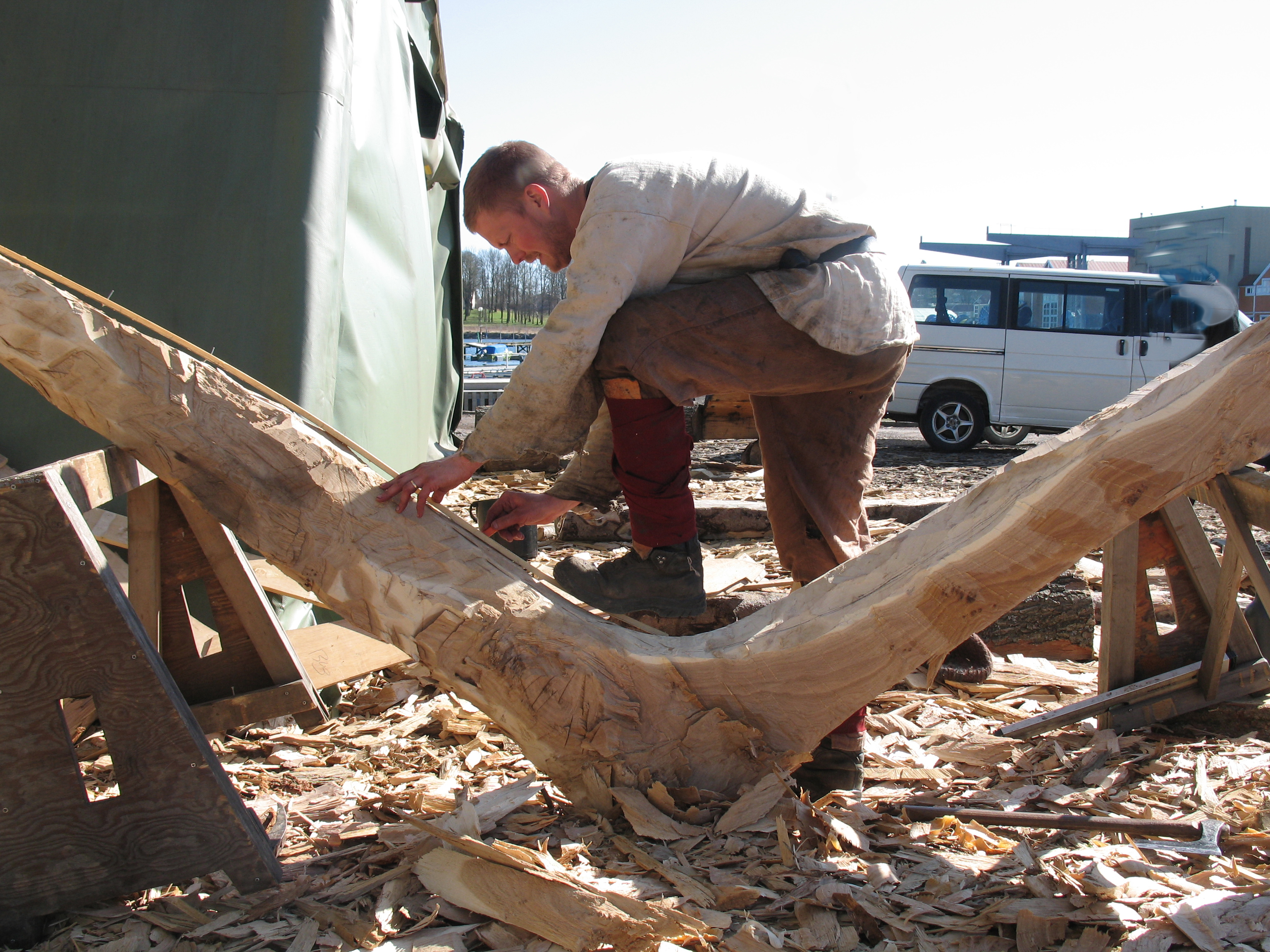 Hugging av band til skipets stevn, sjølvokst emne